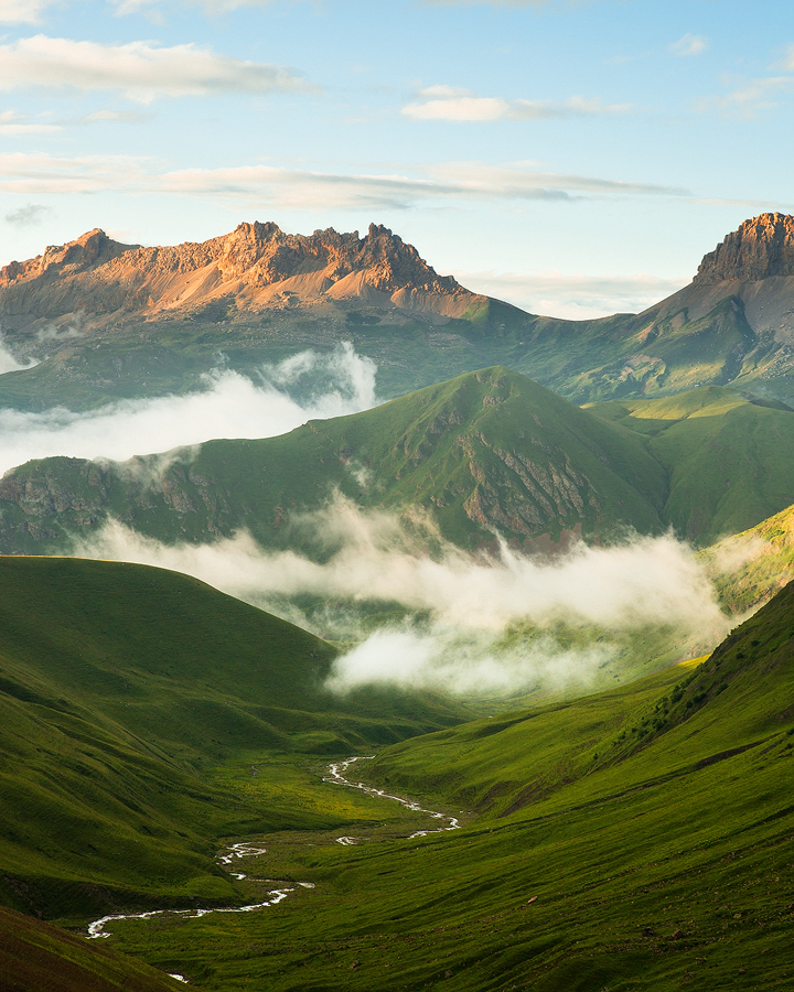 Национальный парк Алания, Ирафский район This image is related to the protected area of Russia number 1500198